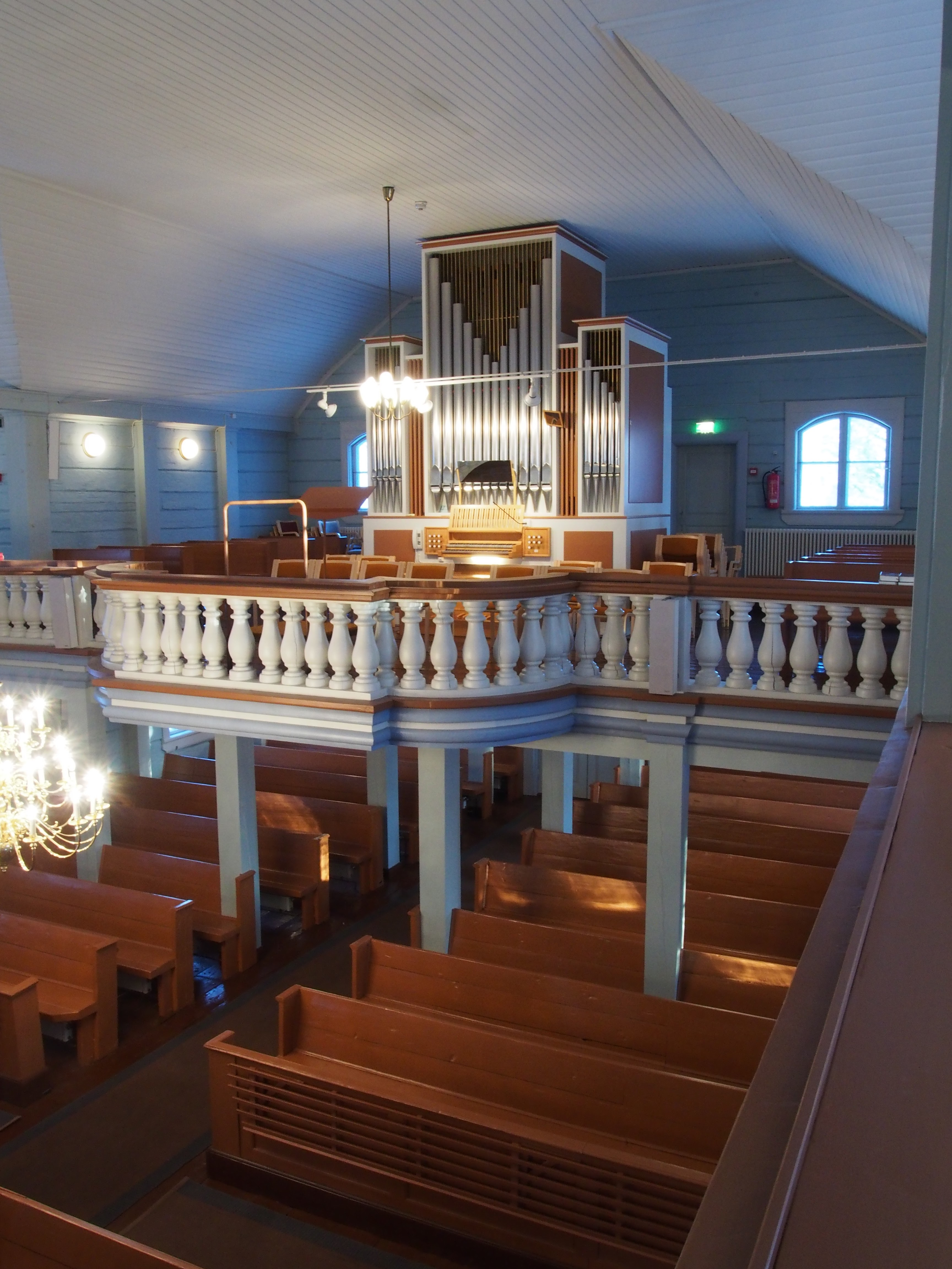 Urkurakentamo Tuomi 1982.